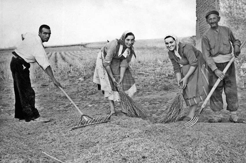 Imagen de trilla tradicional, barriendo el muelo en la era con escobas de ternilla, rastras y rastrillos, antes de limpiarlo